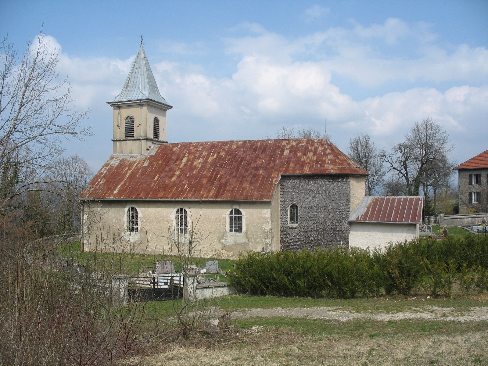 Église de Larrivoire en 2009